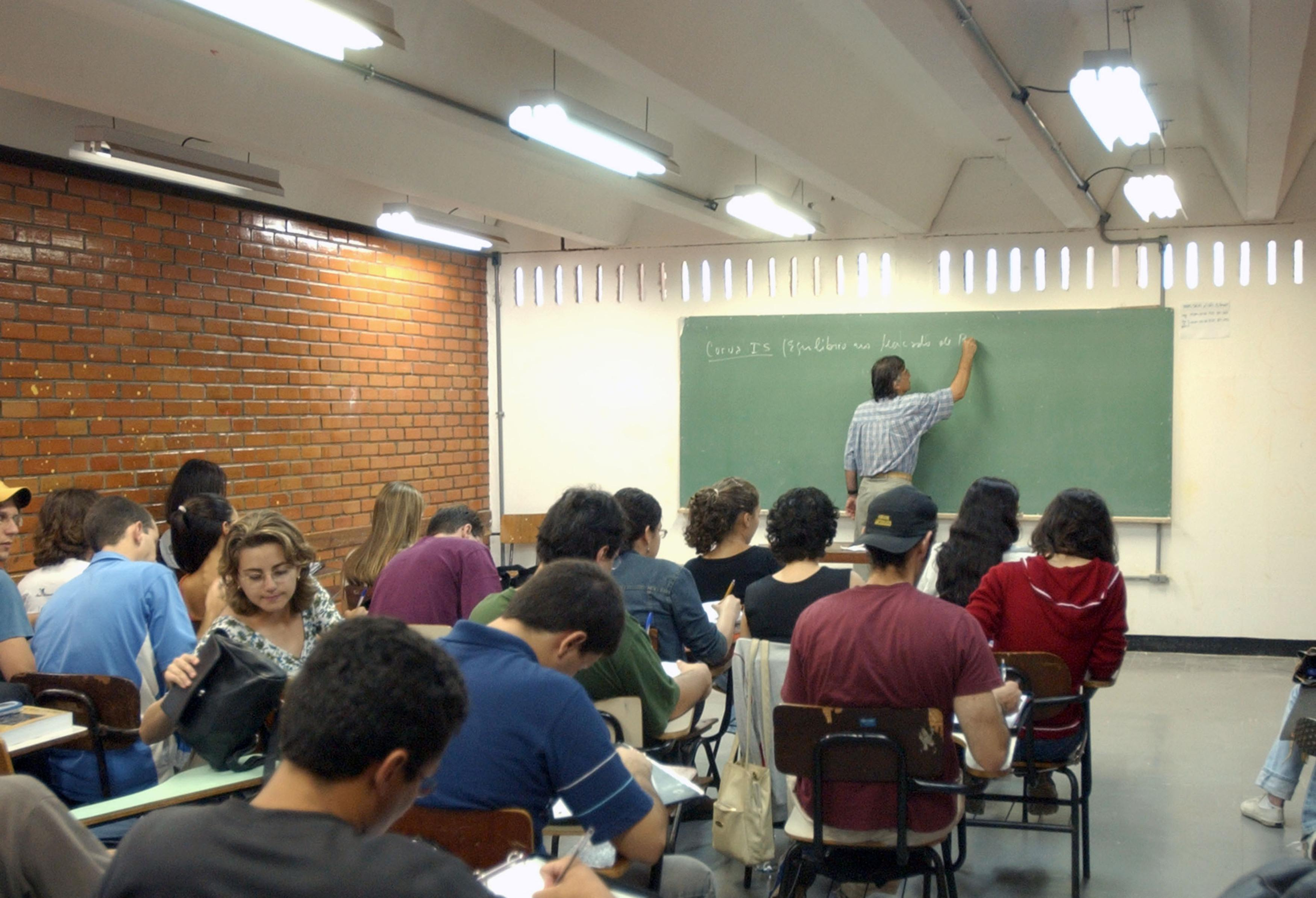 Brasília - Jovens se preparam para o Exame Nacional do Ensino Médio (Enem). O exames serão aplicados neste fim de semana, dias 6 e 7 de novembro, a 4,6 milhões de inscritos. (Arquivo/ABr)